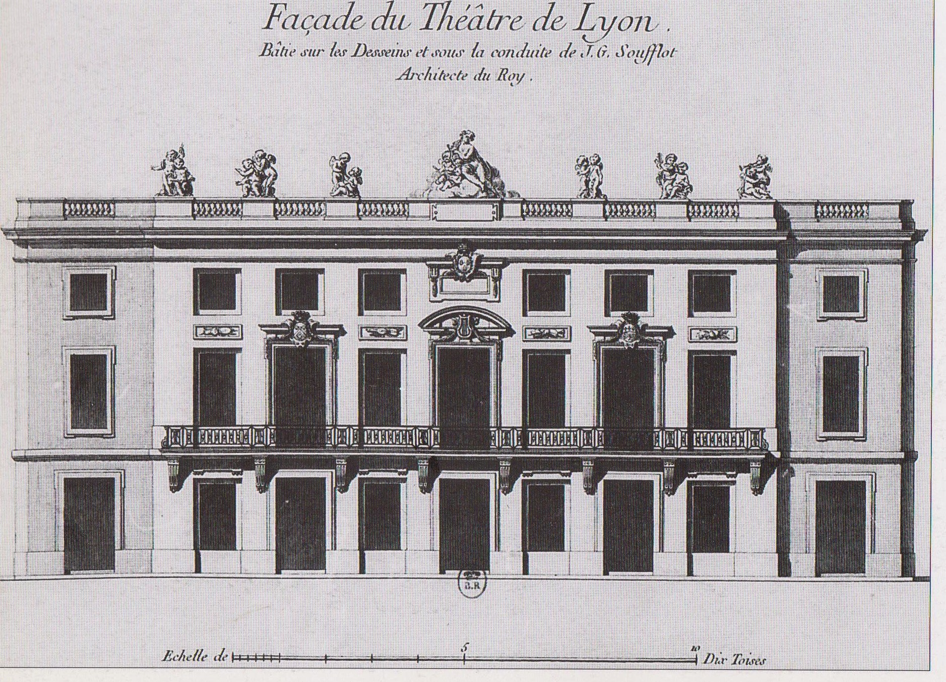 Ce théâtre construit par Soufflot a été démoli vers 1820